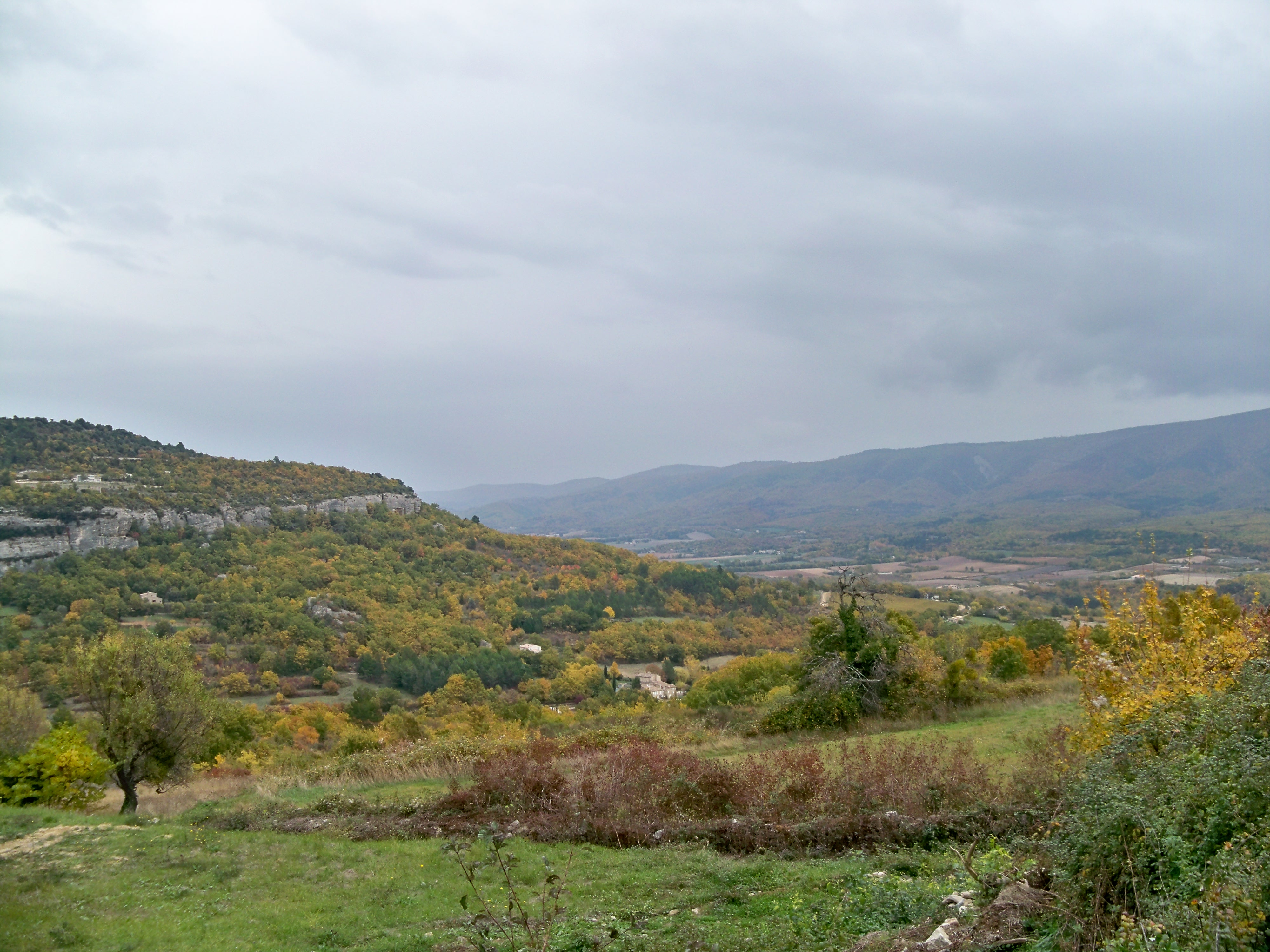 Paysage près de Saint Martin de Castillon